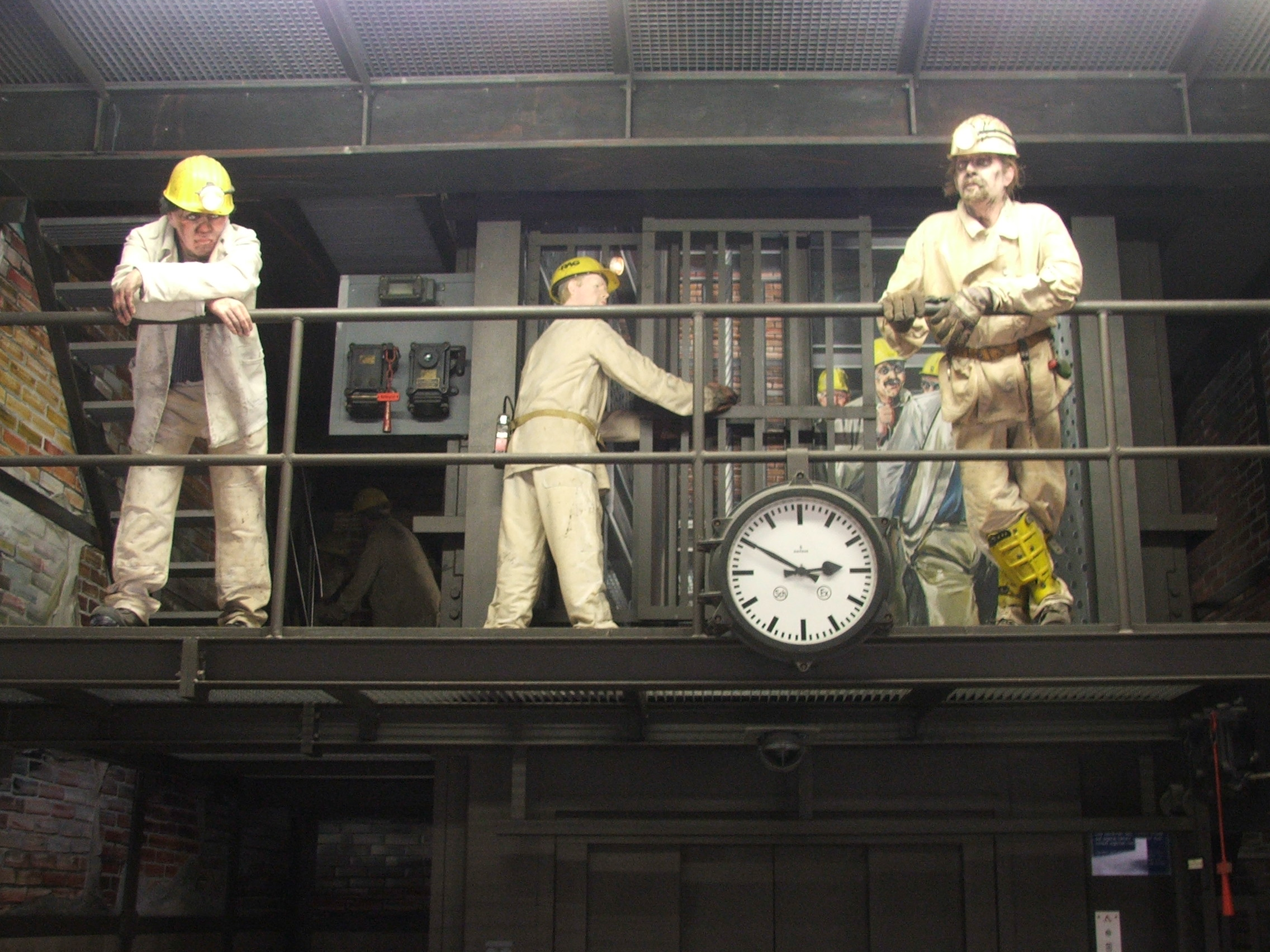 Bergbaumuseum Bochum